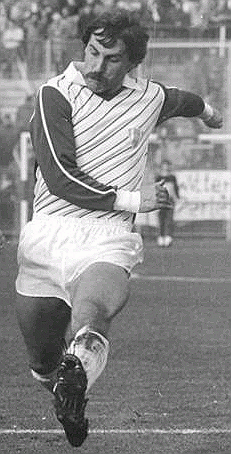 Title: 1. FC Union - Wismut Aue 0:0 Factual corrections and alternative descriptions are encouraged separately from the original description. Additionally errors can be reported at this page to inform the Bundesarchiv. Original historic description: ADN-ZB-Mittelstädt-13.12.86/kb-Berlin: Fußball-Oberliga- 1. FC Union-Wismut Aue 0:0- Am 13. und letzten Spieltag dieses Jahres kam es in der Berliner Wuhlheide zu einer gerechten Punkteteilung zwischen beiden Mannschaften. Hier ein Zweikampf zwischen Holger Sattler (l.-1. FC Union) und Wismut-Stürmer Harald Mothes.